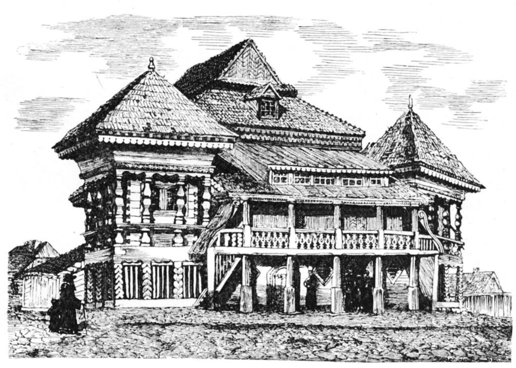 ilustracja z książki Zygmunta Glogera "Encyklopedia staropolska tom I" publikacja Wydawnictwa Piotra Laskauera i S-ki Warszawa 1900